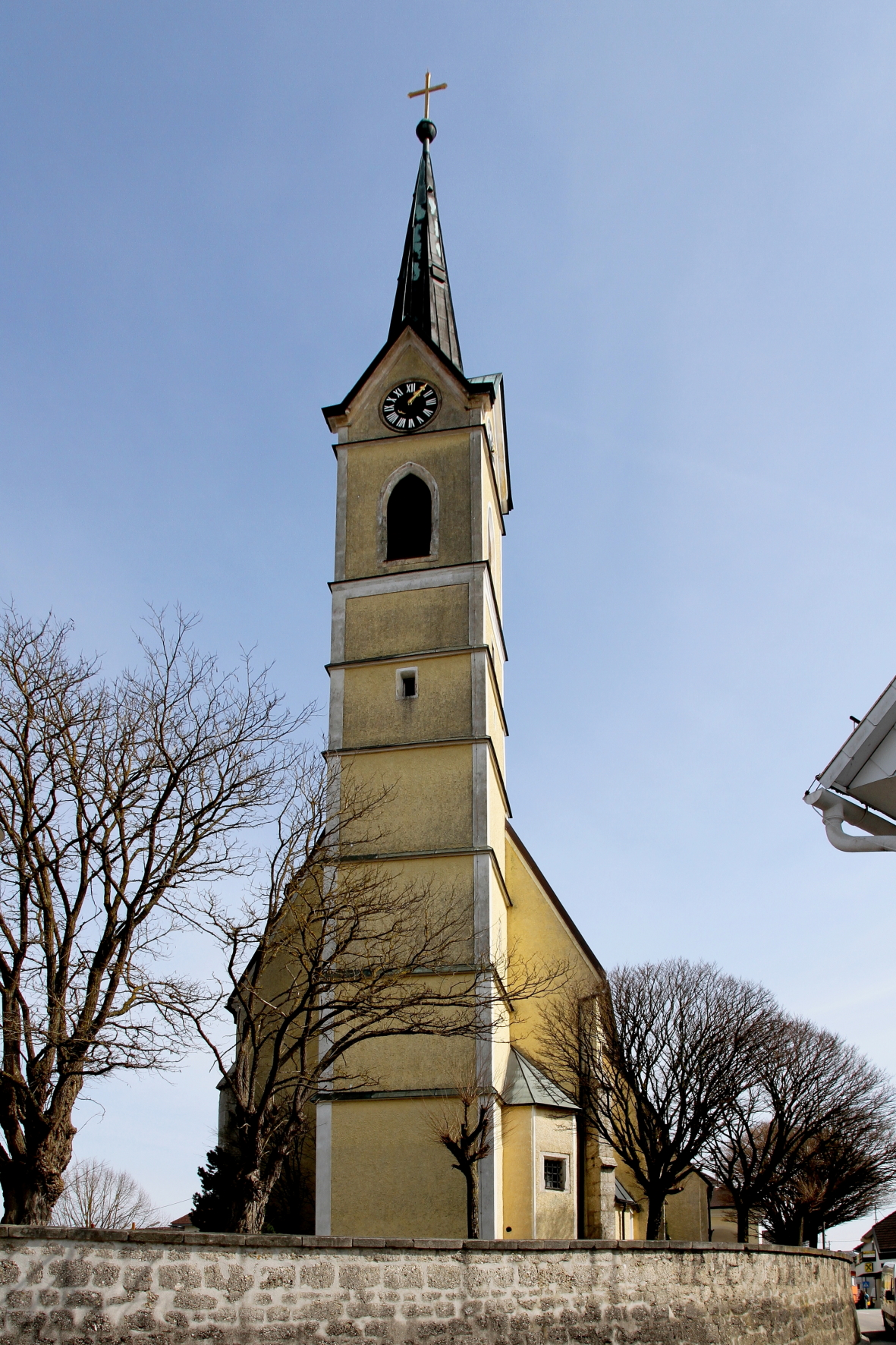 Katholische Pfarrkirche hl. Jakob der Ältere in der oberösterreichischen Gemeinde Roitham. Ein spätgotischer Bau mit einem mächtigen vorgestellten Westturm.